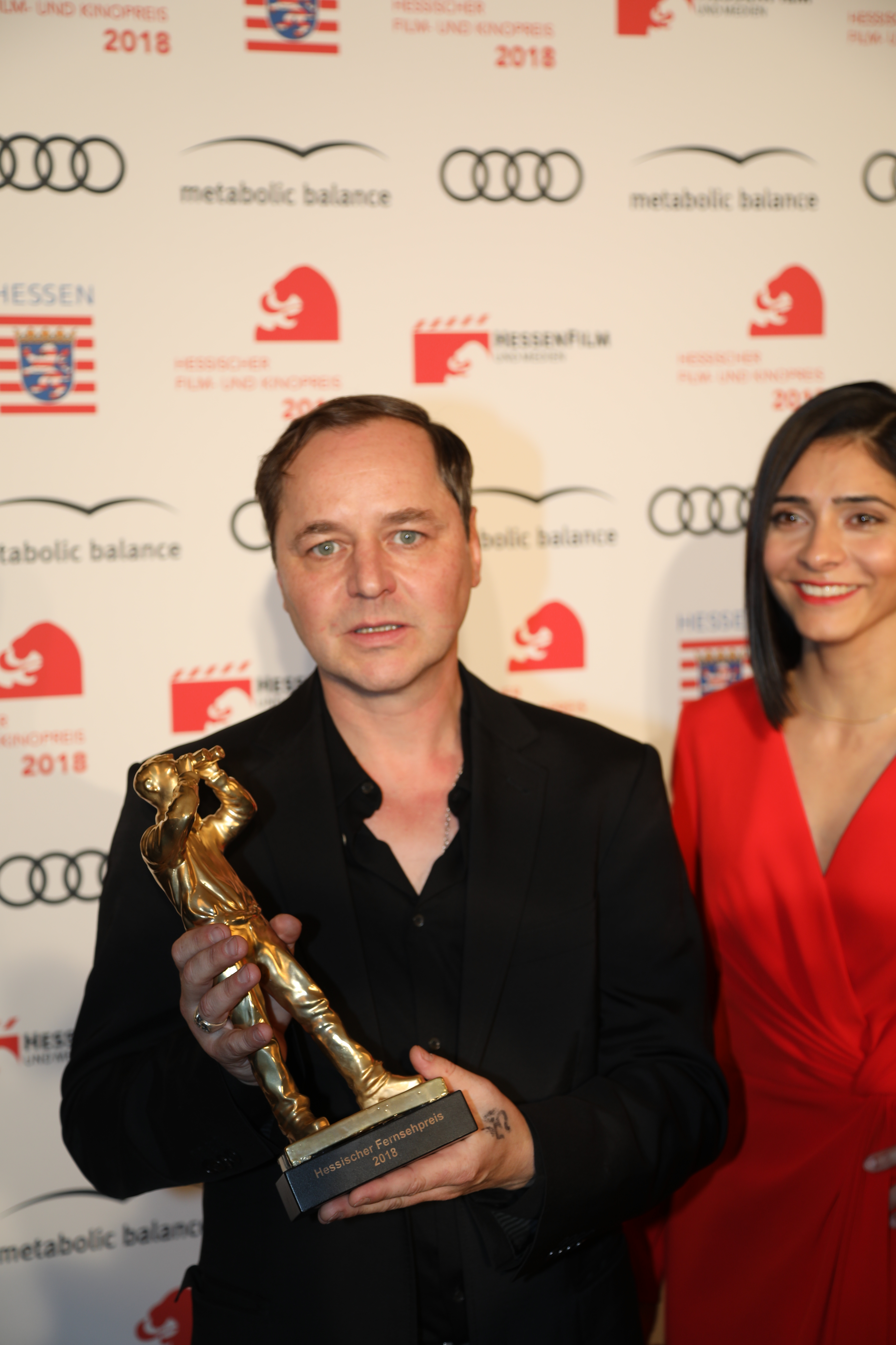 Thomas Schmauser beim Hessischen Film- und Kinopreis 2018